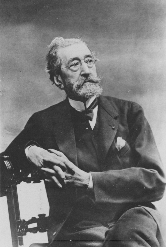 Charles Jalabert par Albert Bergeret & Cie